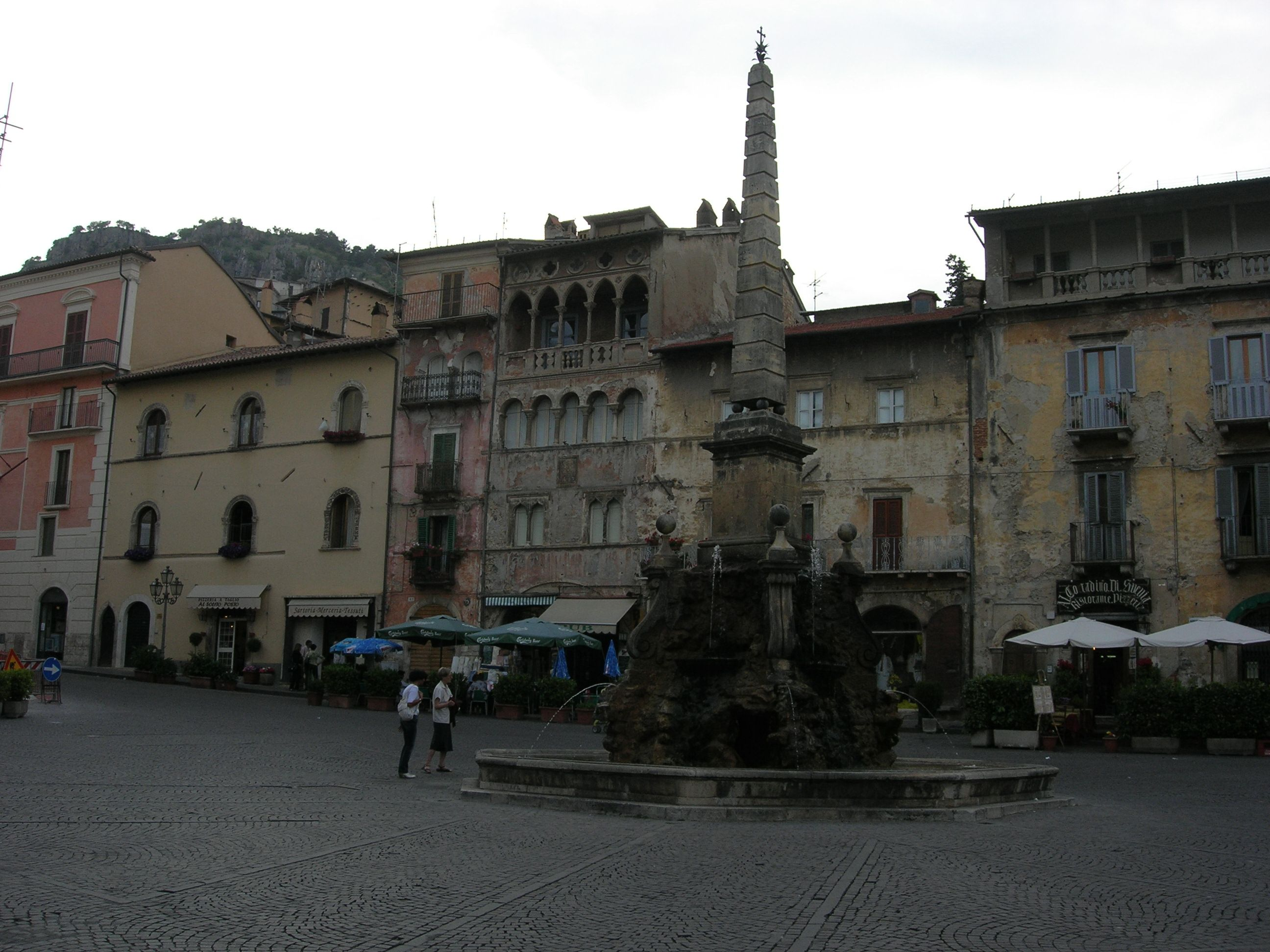 Piazza dell'Obelisco in Tagliacozzo towards south